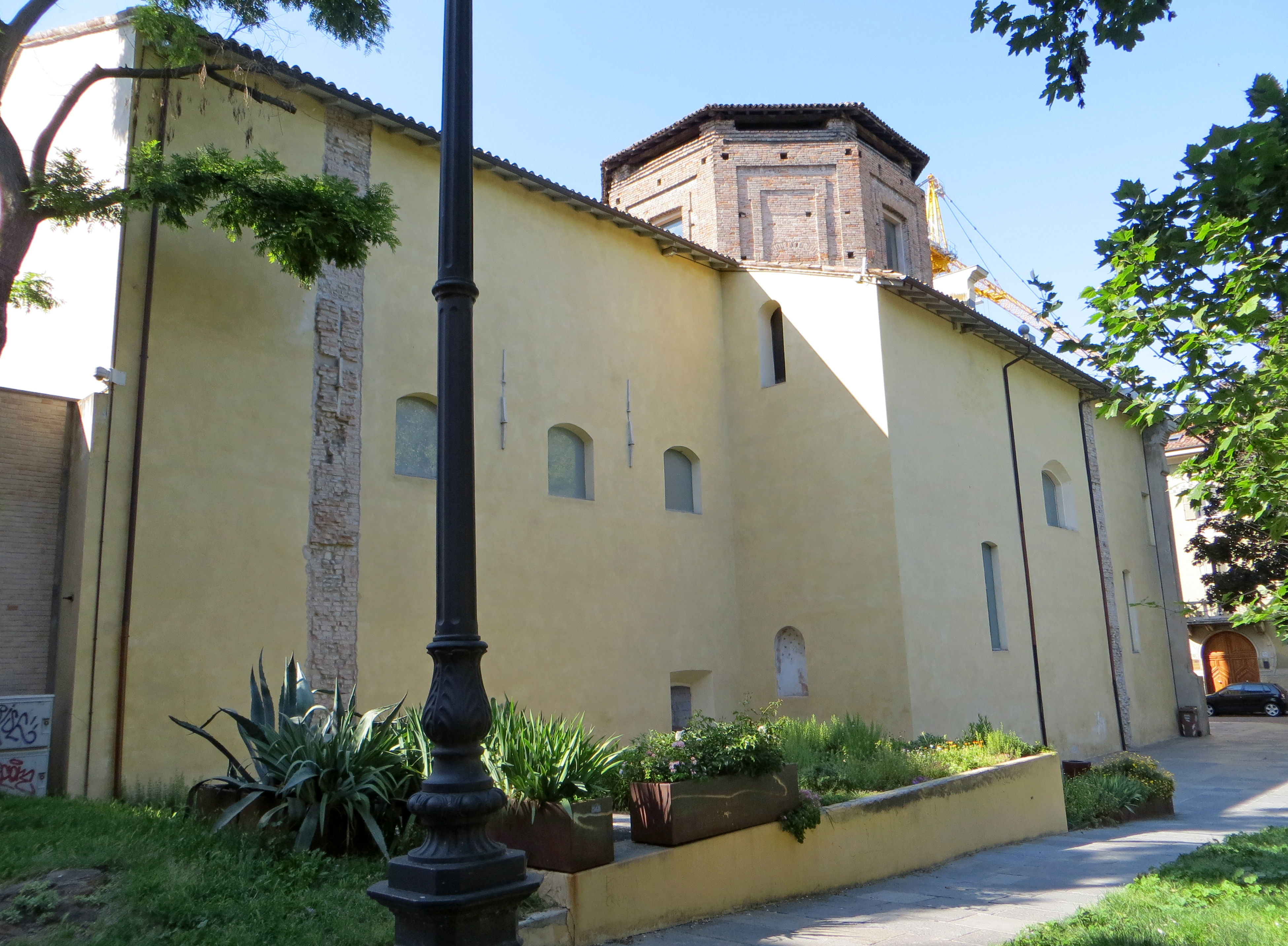 Chiesa di Santa Elisabetta (Parma) - lato sud-est